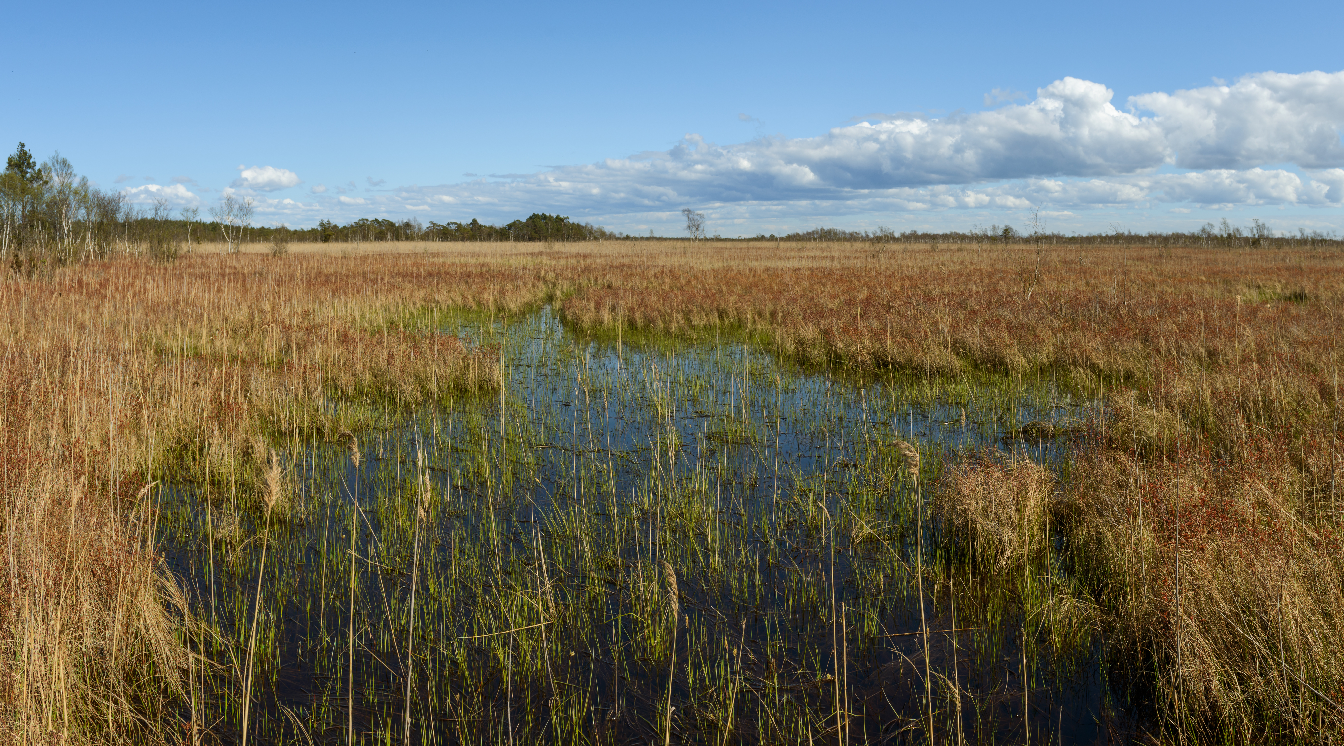 Leidissoo looduskaitseala